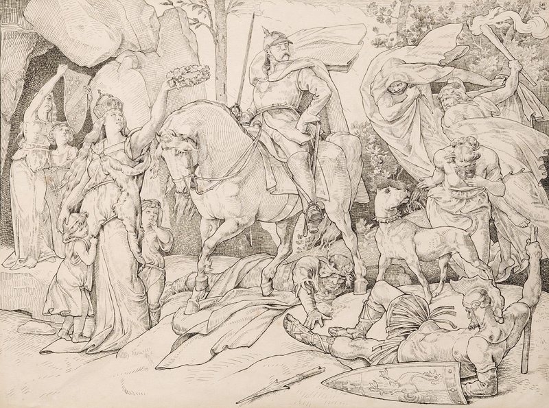 Apotheose Bismarcks. Federzeichnung, 42,5 x 57 cm, verso sign. u. bez. Moritz von Beckerath München comp & gez